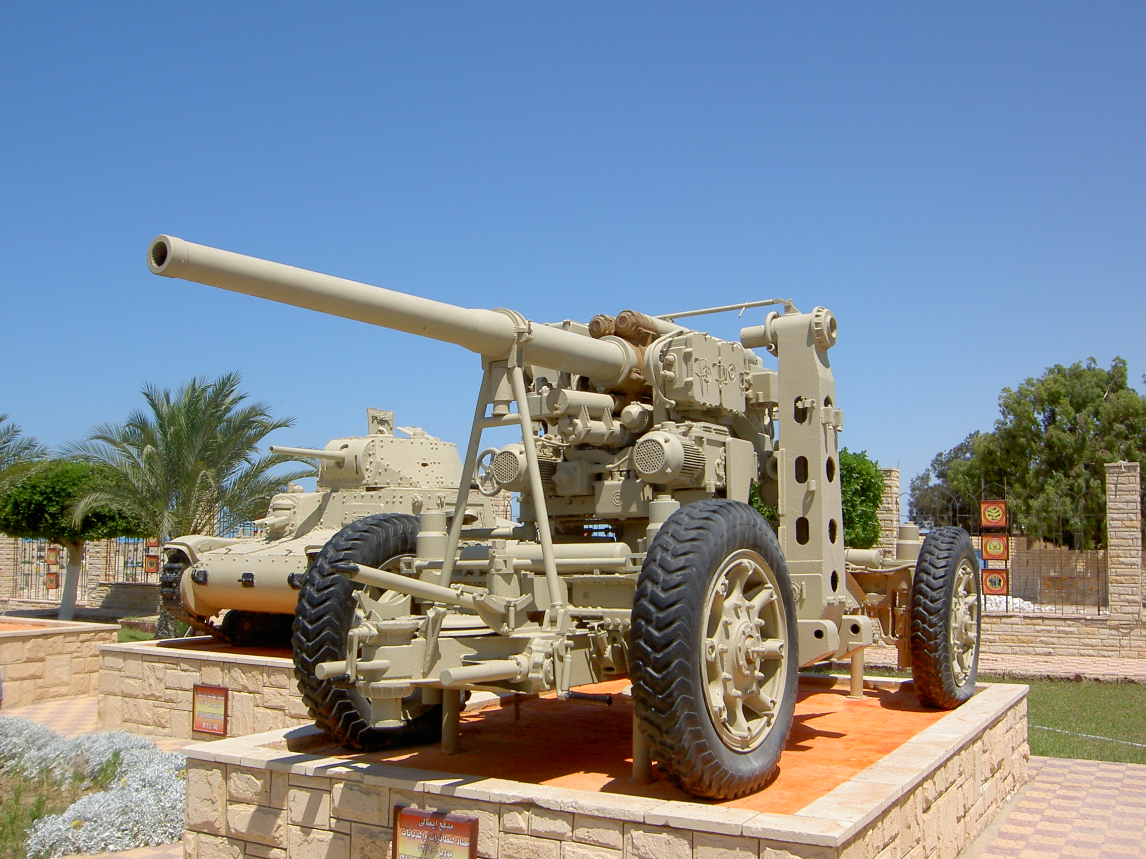 Cannone contraereo 90/53 Mod 39 della II guerra mondiale esposto al museo della Battaglia di El Alamein (Egitto)